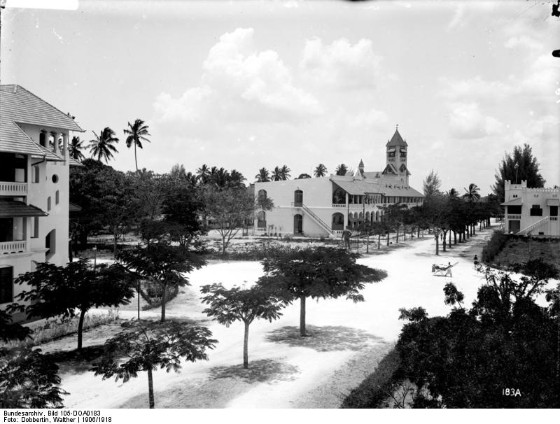 Daressalam, Wissmanplatz